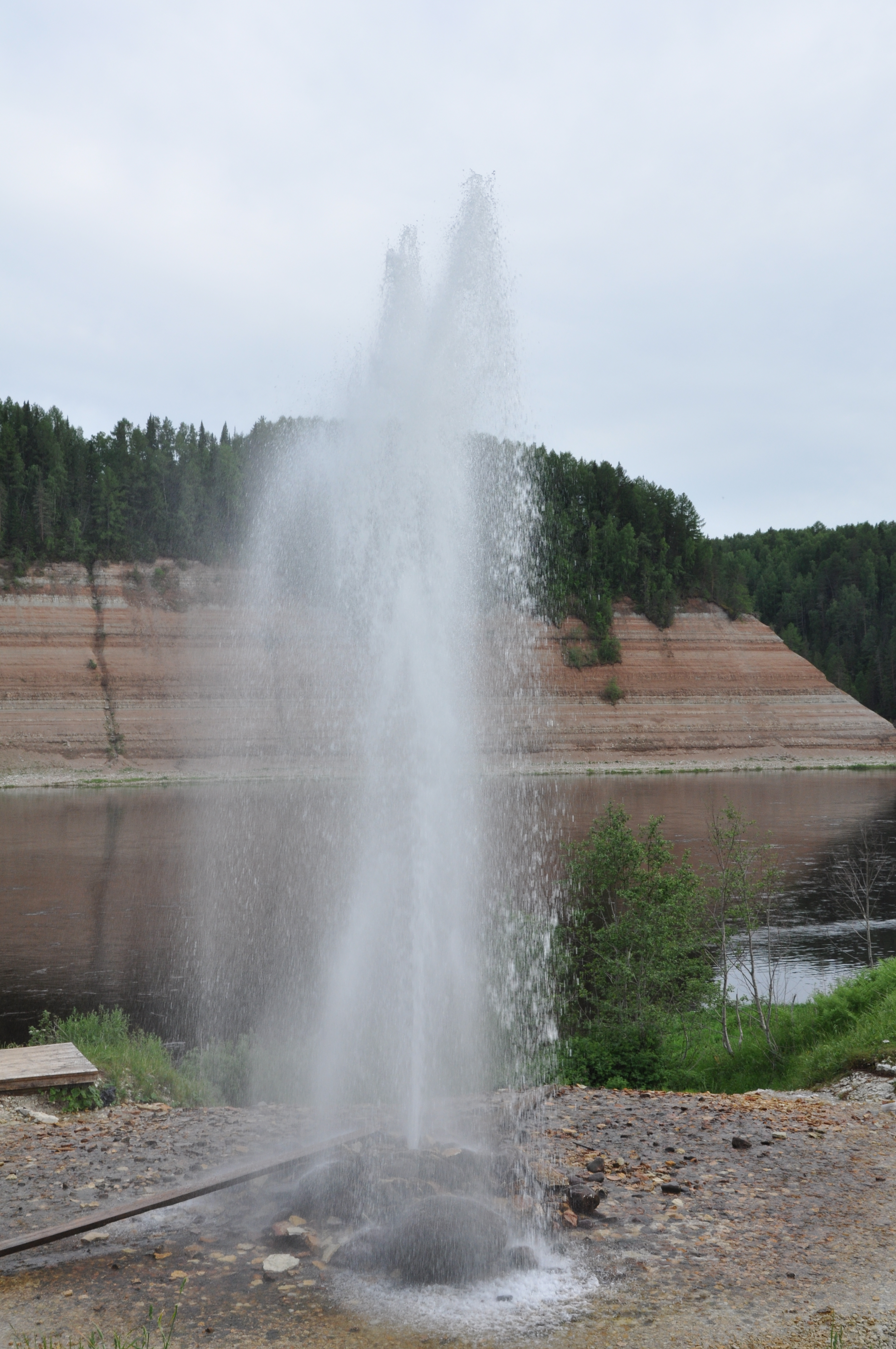 Источник в Опоках (Вологодская область)